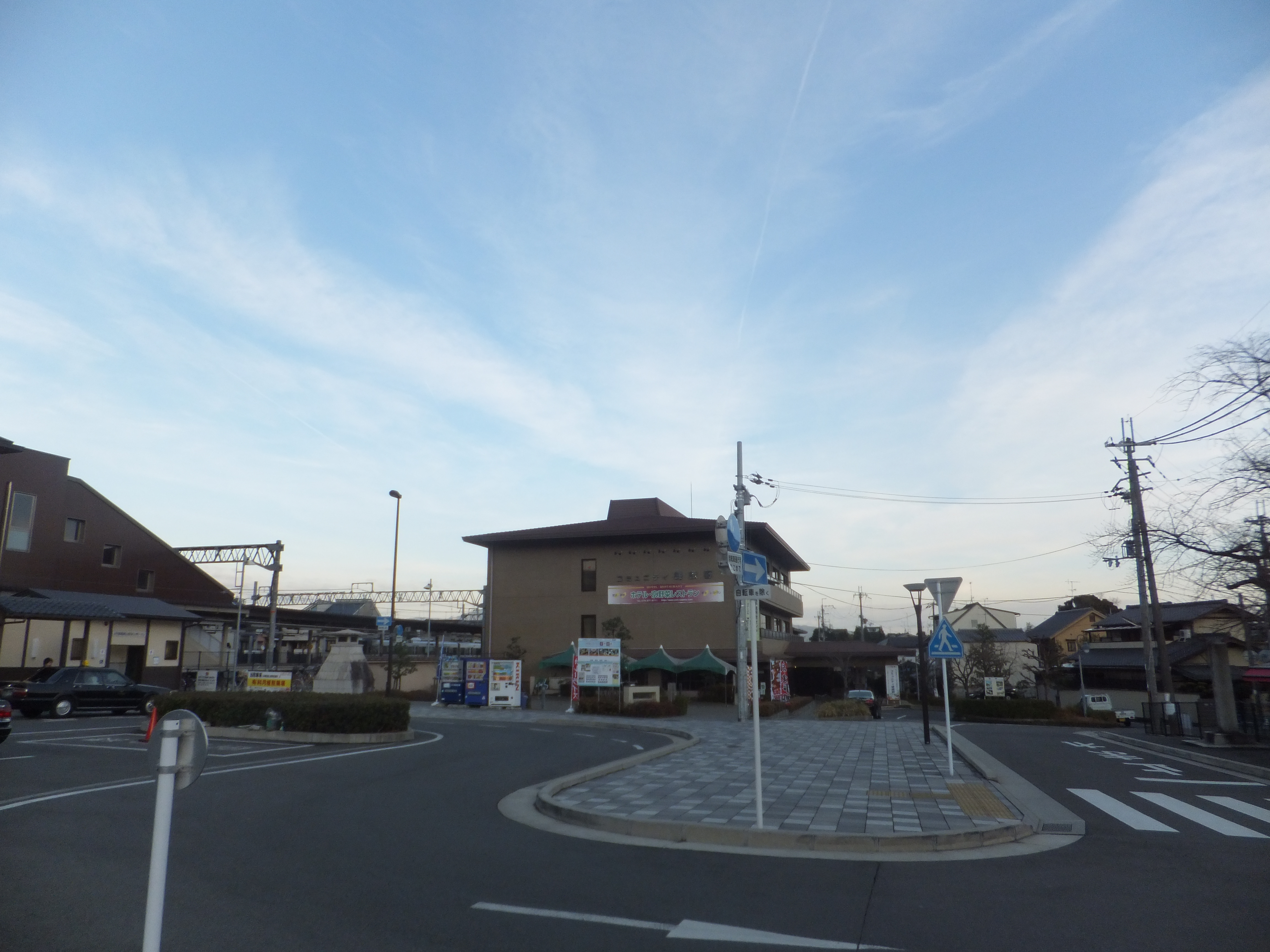 嵯峨嵐山ロータリー